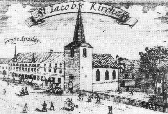 Jakobskirche in Braunschweig um 1711